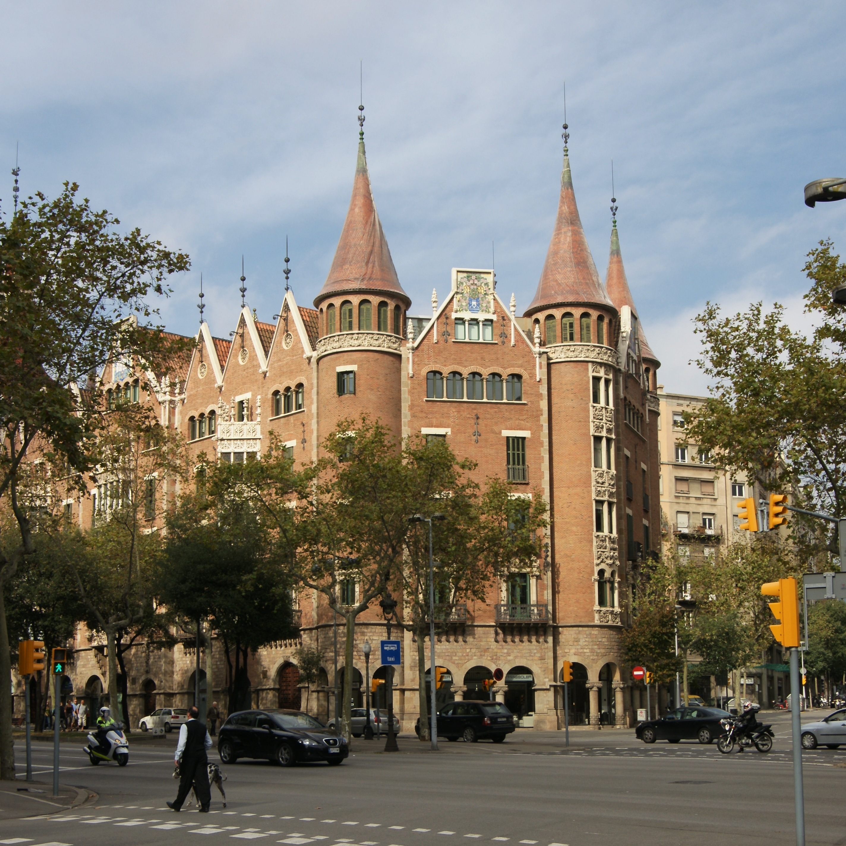 Casa de les Punxes 1903 bis 1905 errichtet von Josep Puig i Cadafalch. Haus der Spitzen, inspiriert durch gotische Bürgerhäuser im Mittelalter, ein Gebäude mit hohen Rundtürmen und spitz zulaufenden Kegeldächern. An der Avinguda Diagonal Nr. 416 - 420, Barcelona.